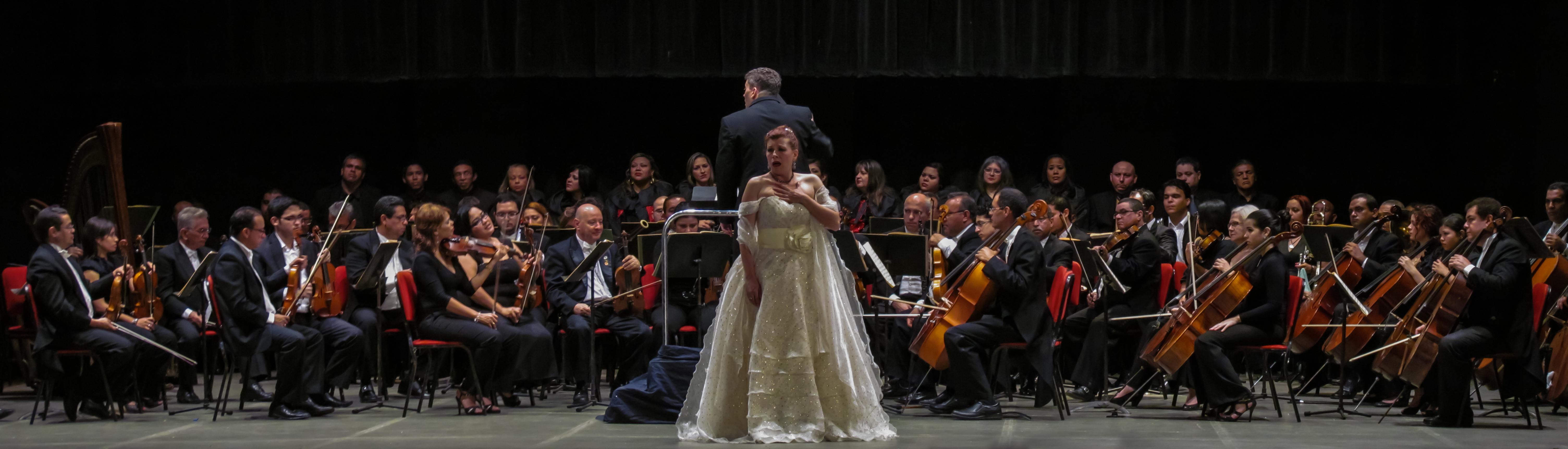 La Traviata en el Teatro Baralt de Maracaibo. Orquesta Sinfónica de Maracaibo y el Grupo Lírico -bajo la dirección del maestro David Ranh-, que acompañaron a los solistas Giovanna Sportelli, Roberto Girón, Idwer Álvarez, Franklyn de Lima y Mairín Rodríguez en las interpretaciones principales.